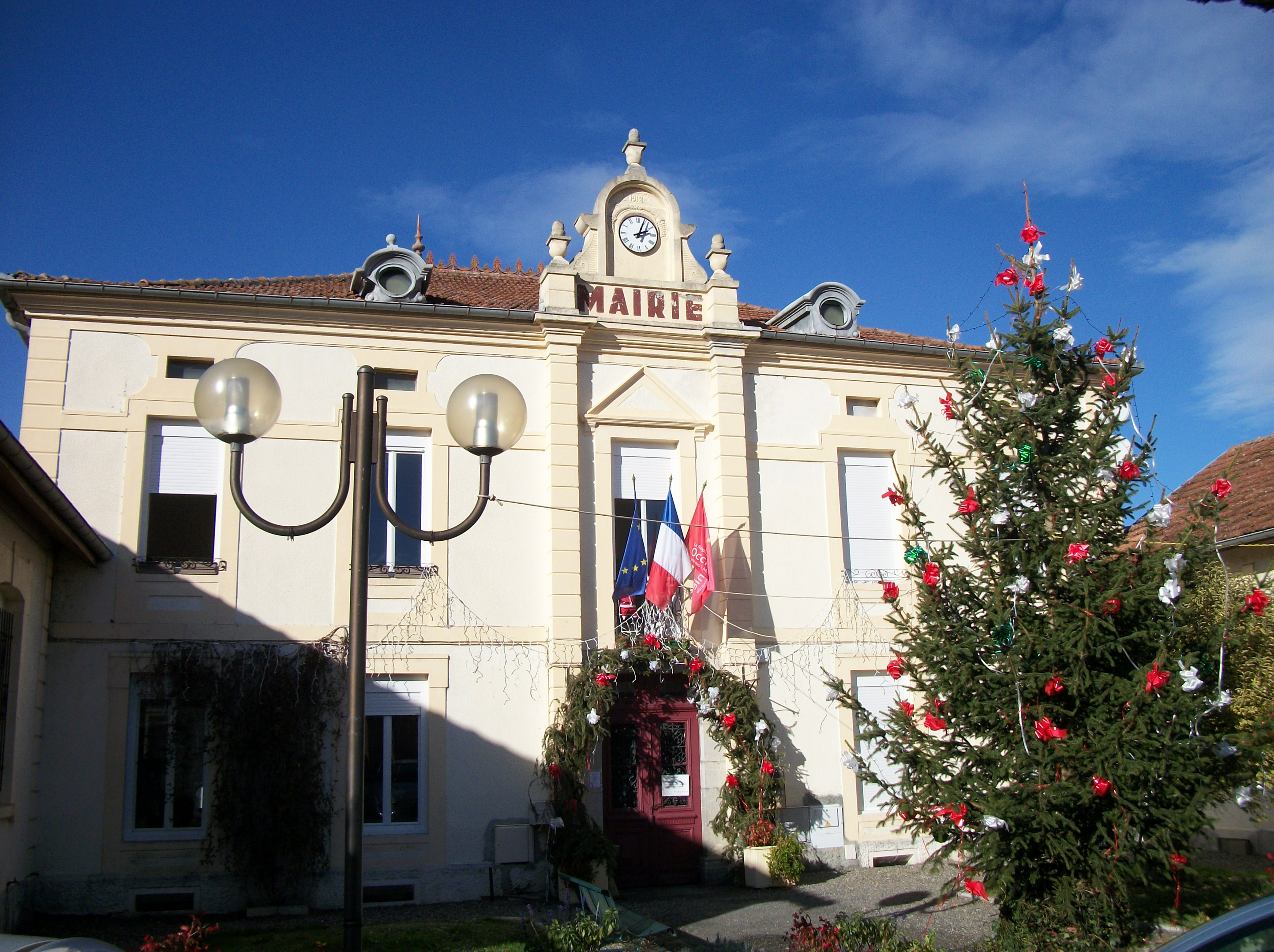 Mairie